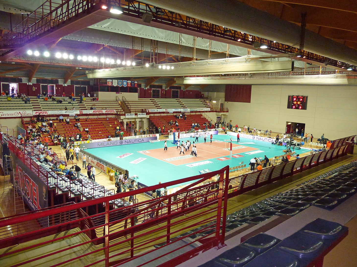 Panoramica dello Sporting Palace di Novara, anche definito "Poli"